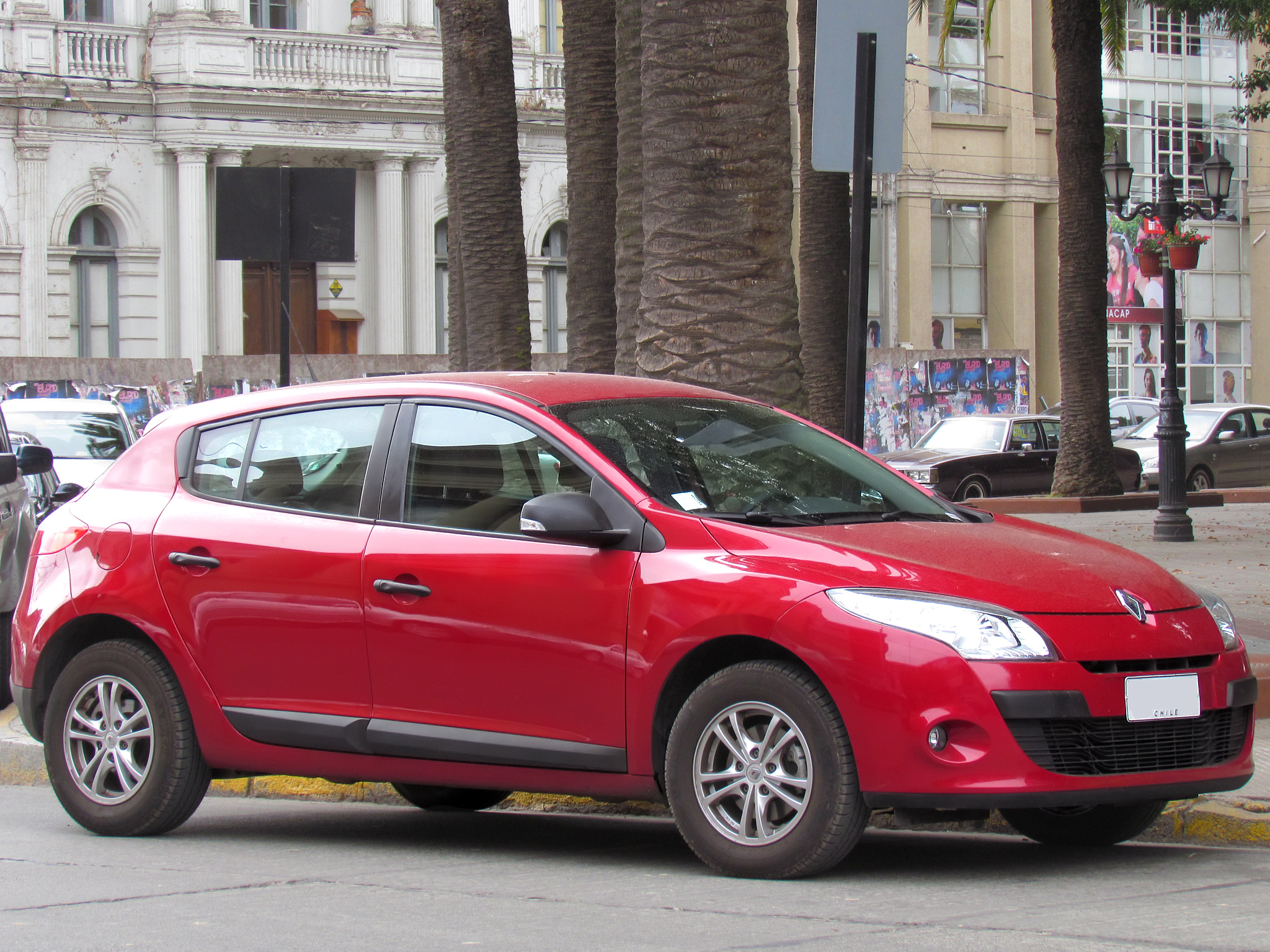 Renault Megane 2.0 Expression 2013